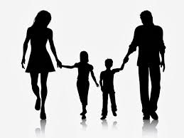 सुखी परिवार का निशान